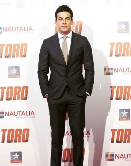 Mario Casas en 2016, en la presentacion de su pelicula 'Toro'